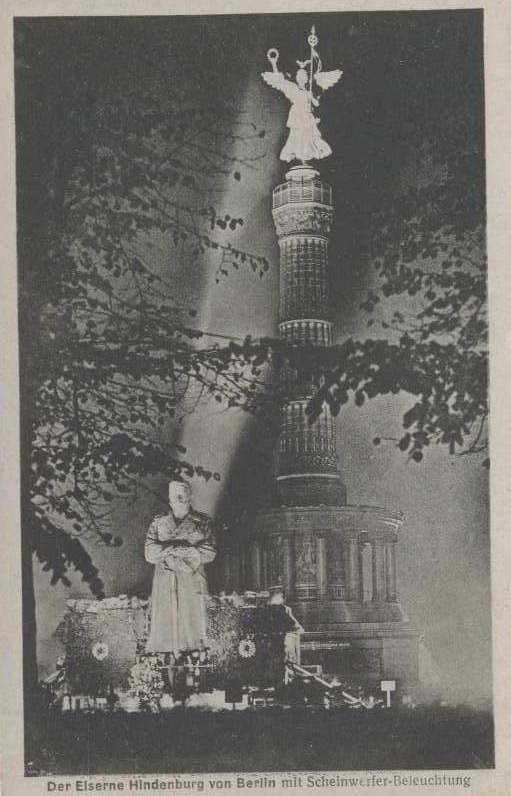 Eisener HIndenburg